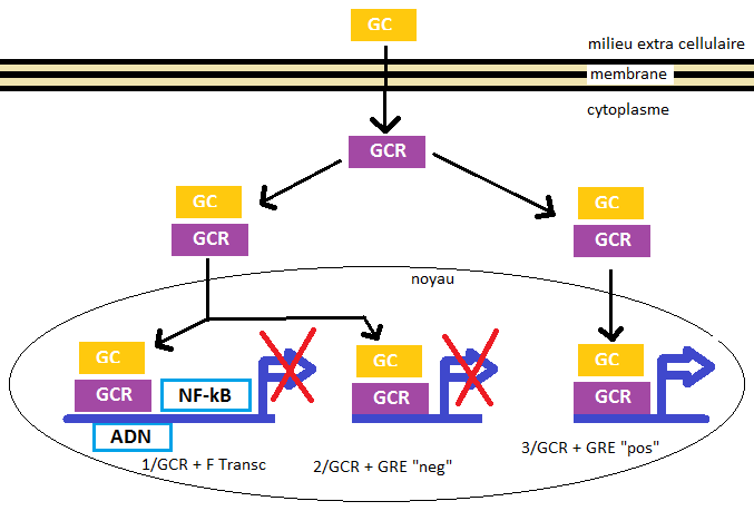 action biochimique de C21-desisobutyryl-ciclésonide (métabolite du ciclésonide)